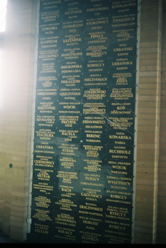 Bazylika w Licheniu - Tablice fundacyjne